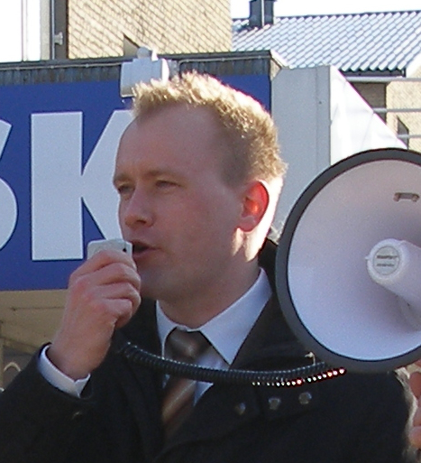 Jakob Hougaard ved åbningen af Netto på Roskildevej 158-162 d. 26. marts 2009.